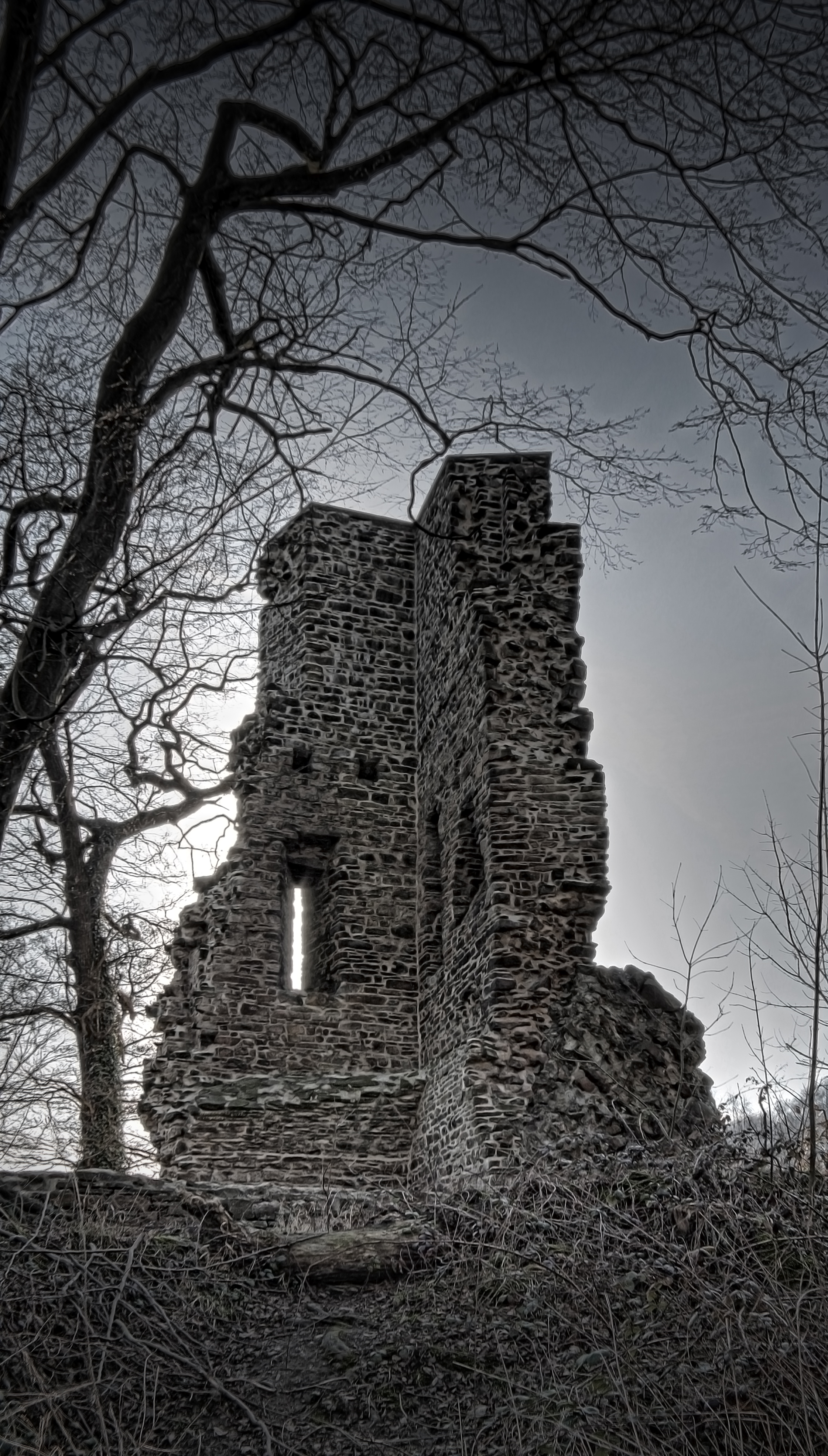 Kattenturm in Essen/Ruhr, Germany